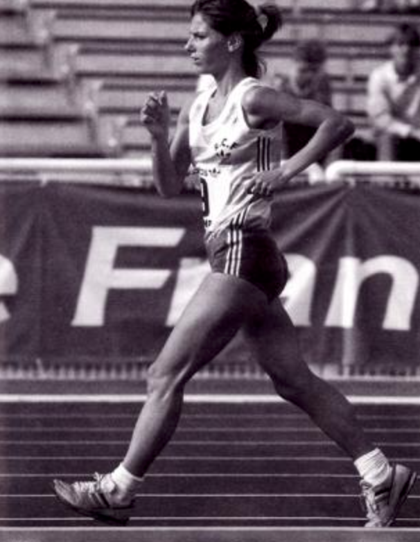 Nathalie Fortain pratiquant la marche athlétique